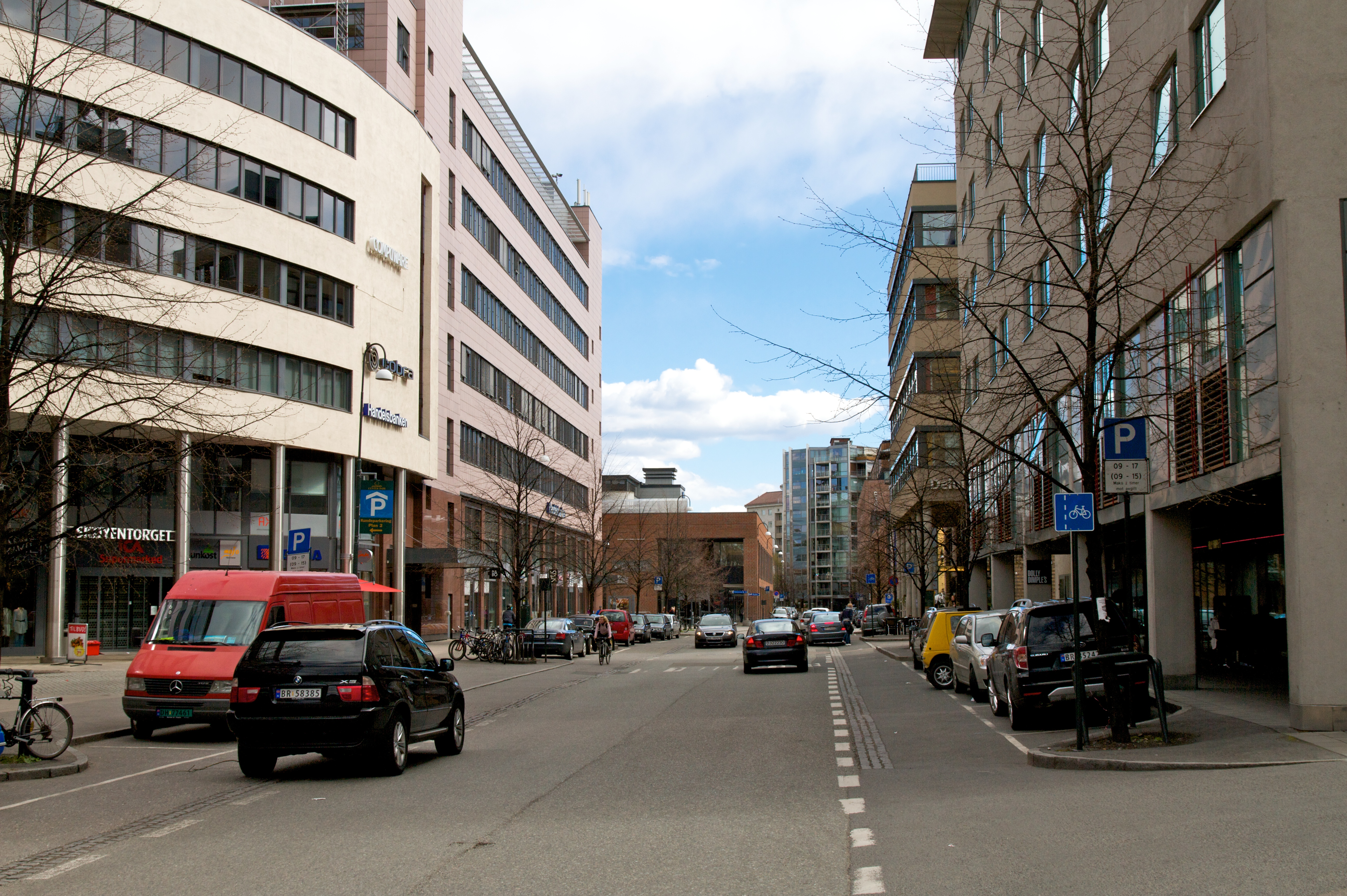 Karenslyst allé i Oslo.